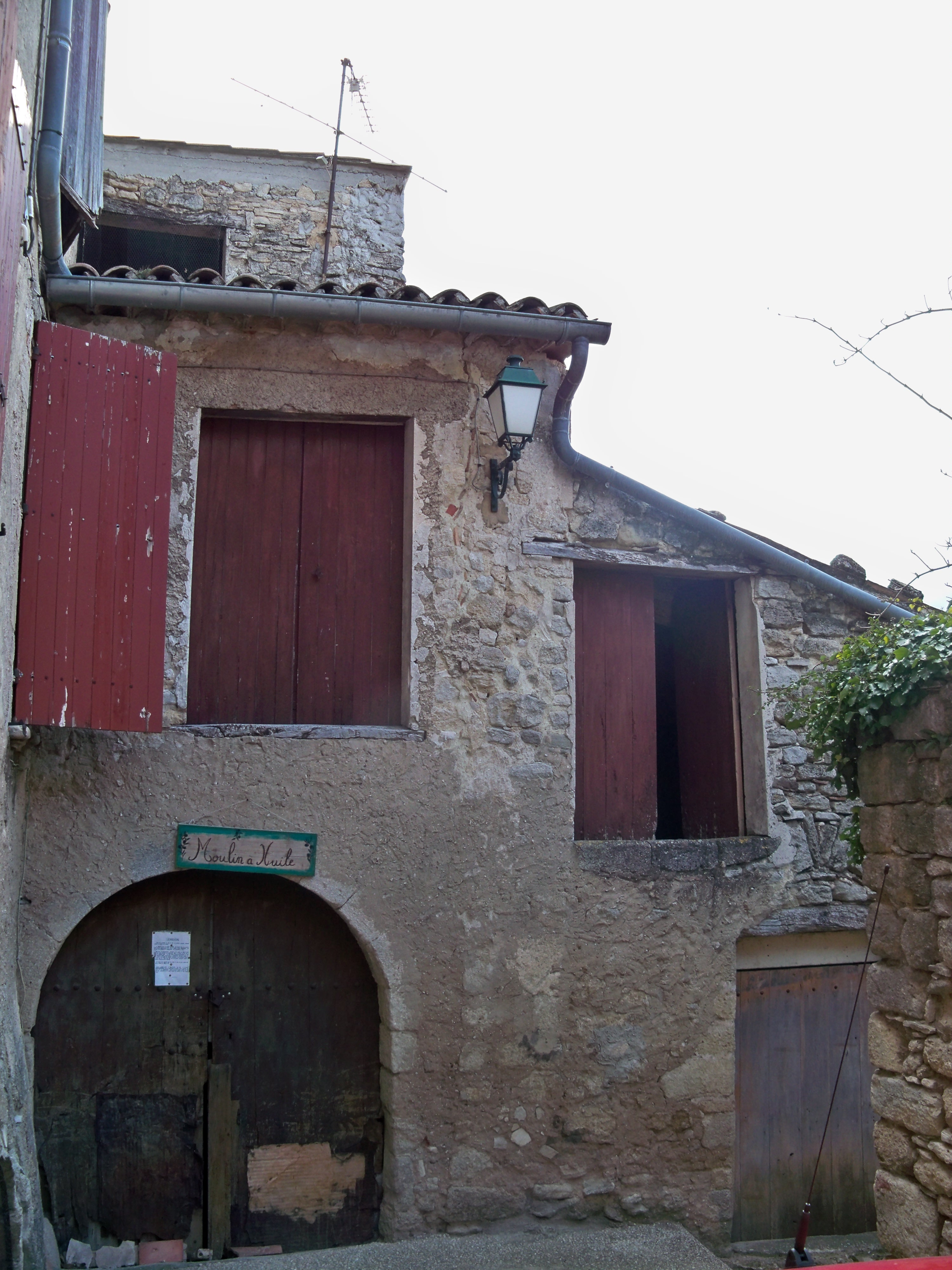 ancien moulin à huile à Viens (84)